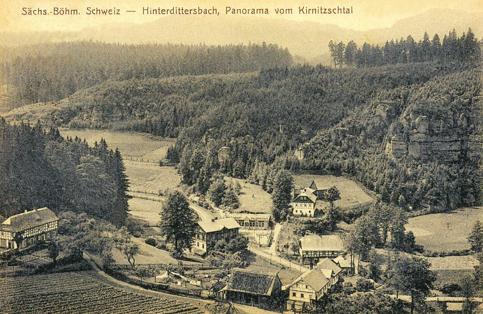 Blick auf die kleine Siedlung Hinterdittersbach (Zadní Jetřichovice) im Kirnitzschtal. Die unmittelbar an der sächsisch-böhmischen Grenze gelegene Ansiedlung war seit dem Ende des 19. Jahrhunderts ein beliebtes Wanderziel. Nach dem II. Weltkrieg wurde die deutsche Bevölkerung vertrieben und die Gebäude abgerissen. Nur ein paar Grundmauern bleiben erhalten.